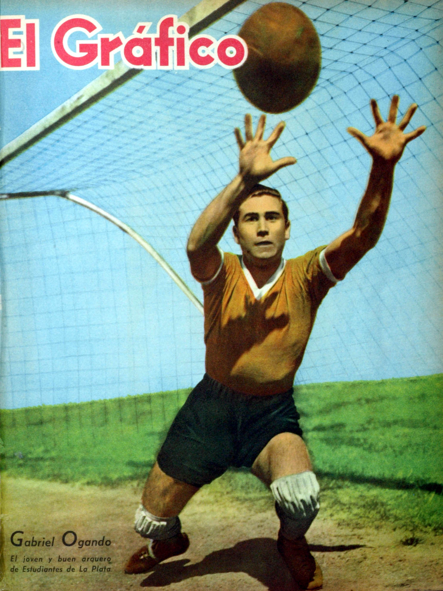 El Grafico del 07 de Noviembre de 1941. Edicion 1165